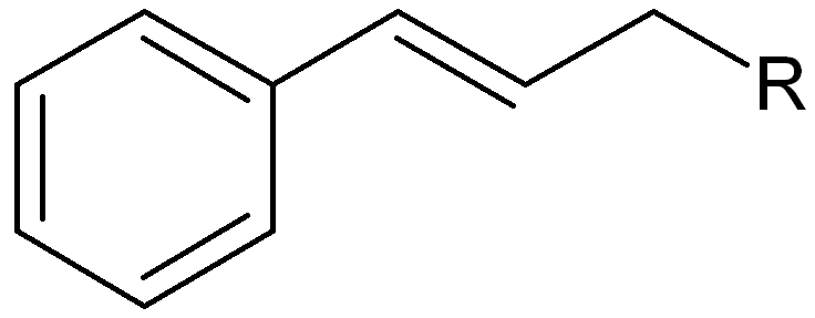 Cinnamylgroep